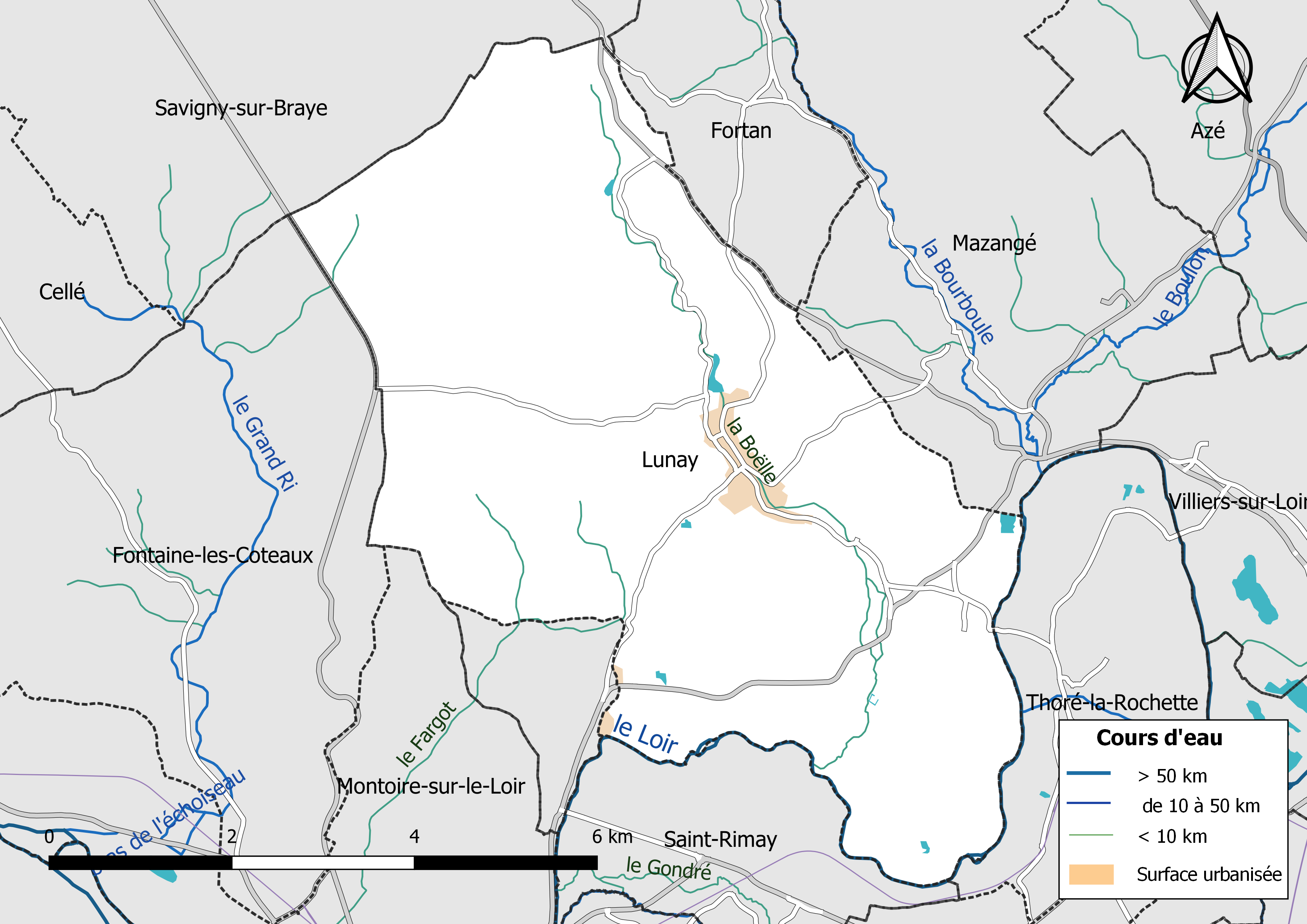 Carte du réseau hydrographique de la commune de Lunay (Loir-et-Cher, France).